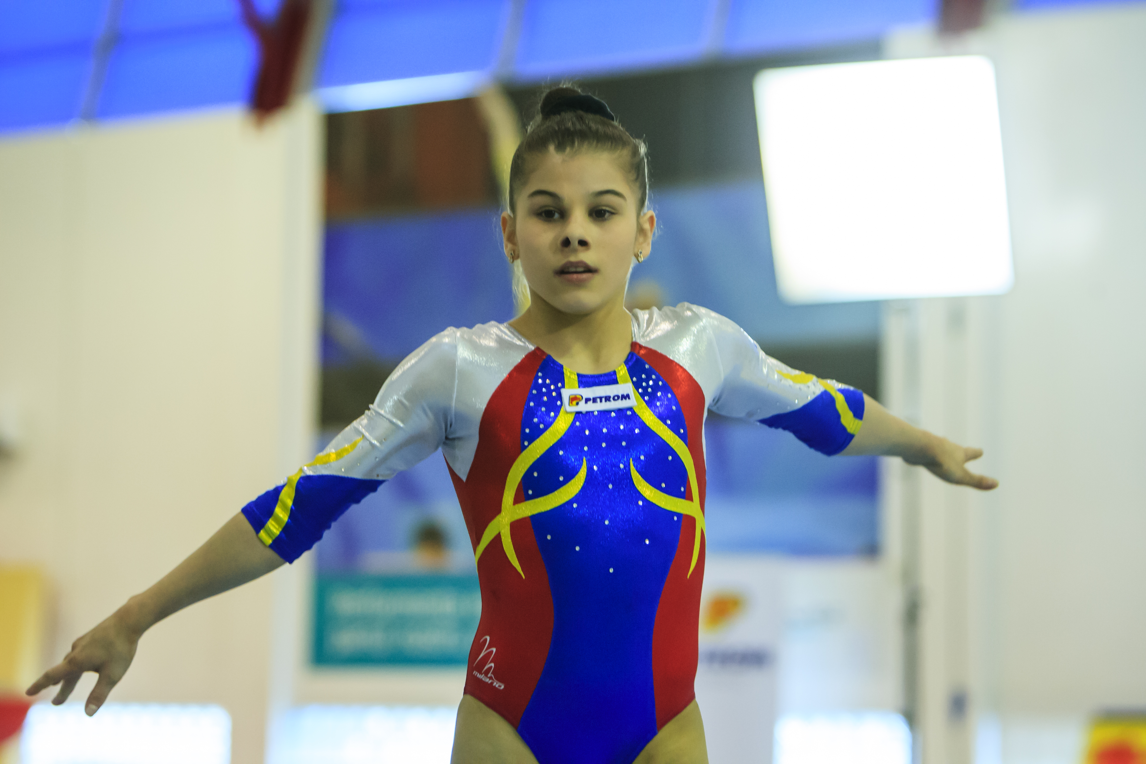 Laura Jurca